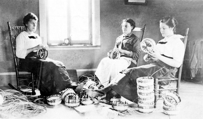 Des vannières d'Odanak, vers 1920.